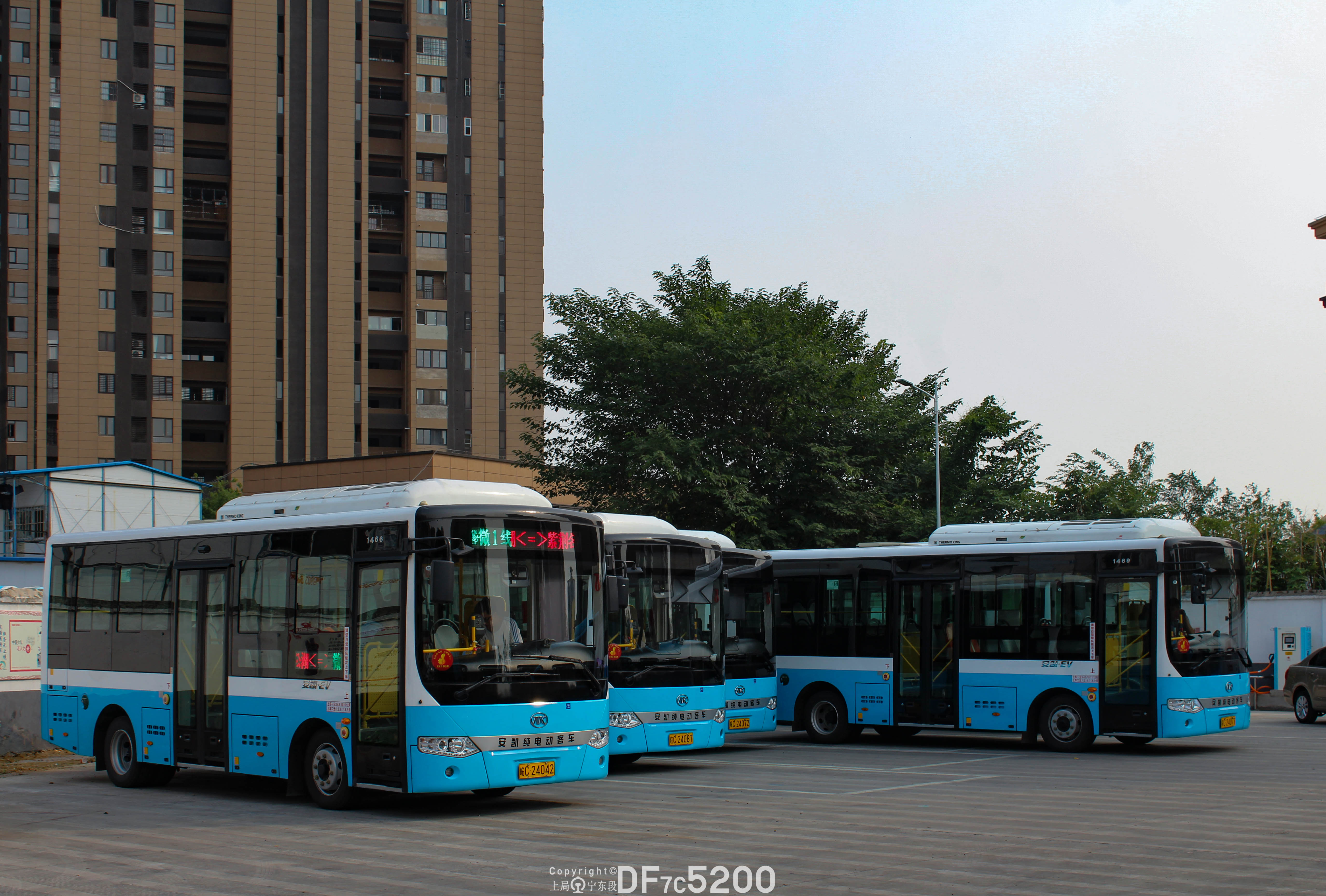 中文（中国大陆）: Bengbu Bus Micro No.1 Line at Zhanggonghu Sta.